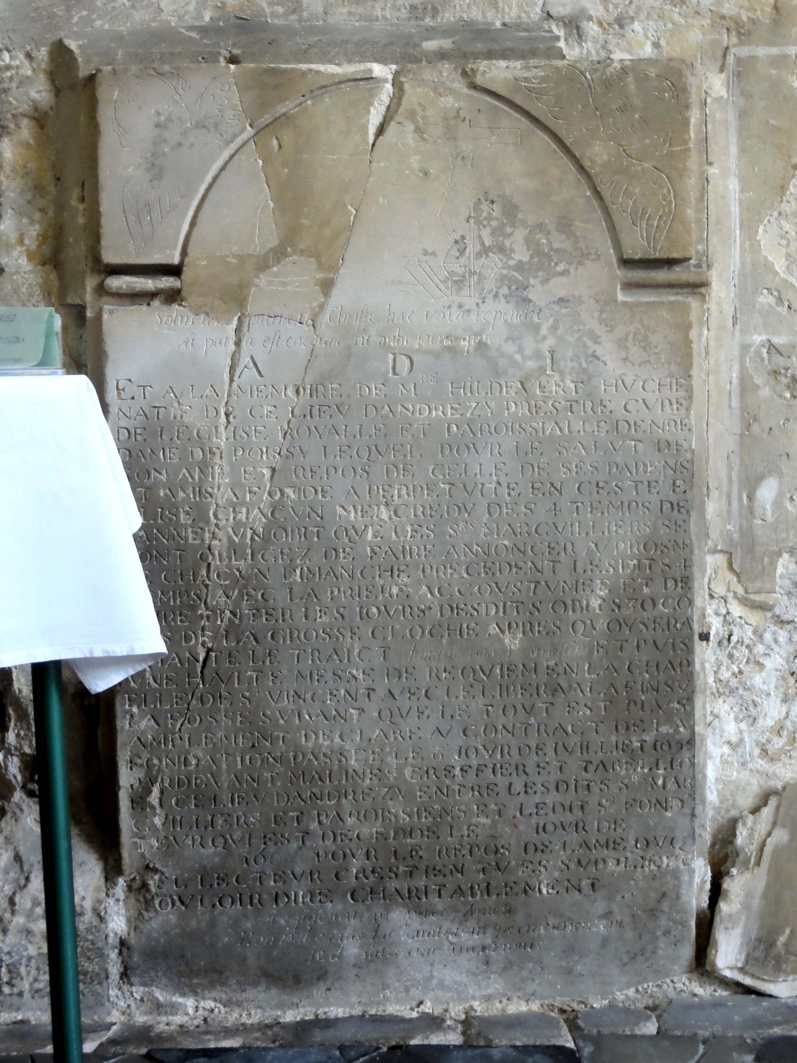 Plaque de fondation.